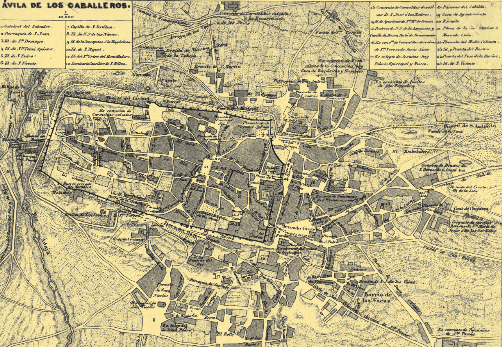 Mapa de la ciudad de Ávila, 1864.